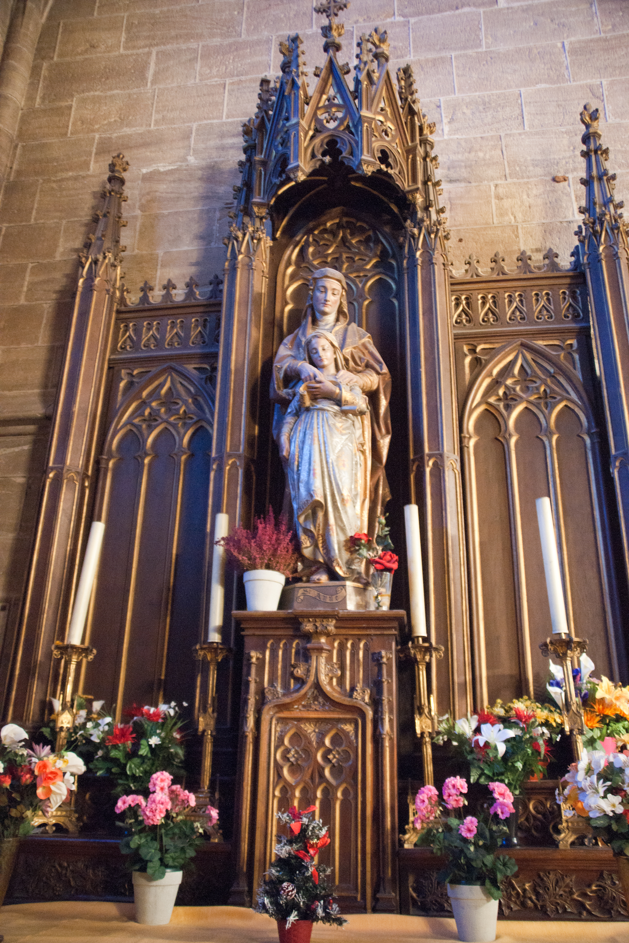 Cathédrale de Mende (Lozère) - Notre-Dame du Perpétuel Secours.